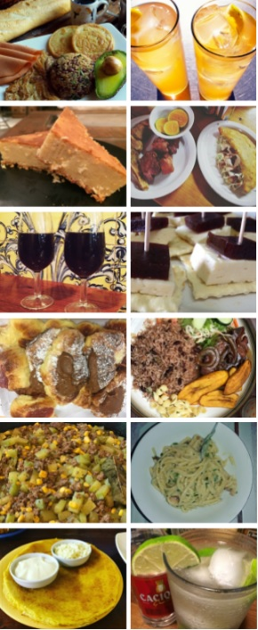 Montaje creado a partir de doce imágenes en Wikimedia Commons, todas publicadas por Aleat88 con licencia CC BY-SA 4.0: File:Gallo pinto cr.jpg File:Ron centenario CR.png File:Tamal asado CR.png File:Empanada arreglada y bocas.jpg File:Mistela naranja.png File:Bocas queso y guayaba.png File:Tosteles fresa dulce de leche.png File:Casado de rice and beans.png File:Picadillo de chayote.png File:Macarrones en salsa blanca.png File:Chorreadas CR.png File:Guaro sour CR.png